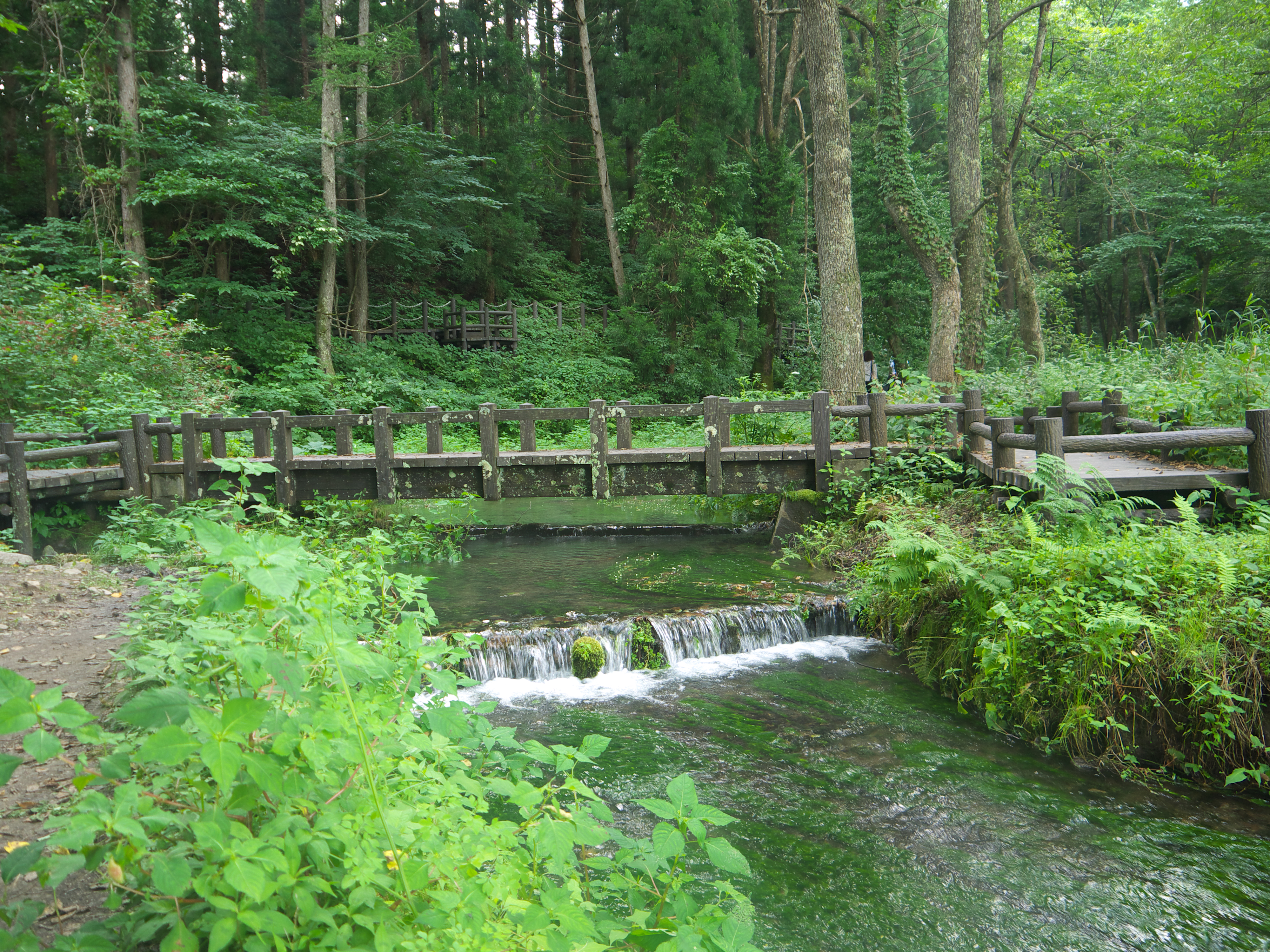 名水百選姫川源流